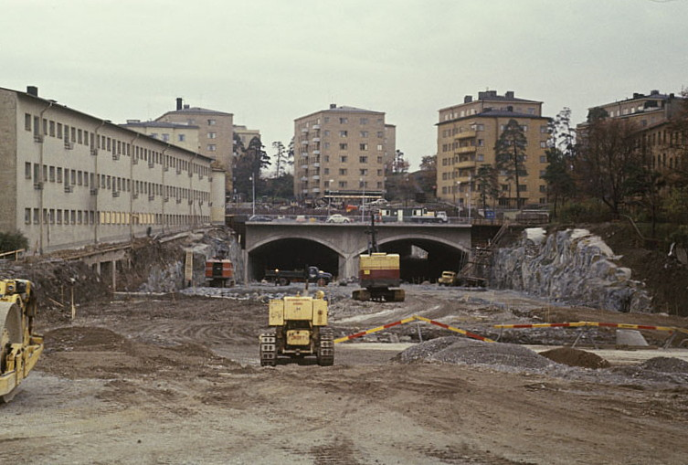 Essingeleden under byggnad vid Fredhäll med Fredhällstunneln, vy mot syd